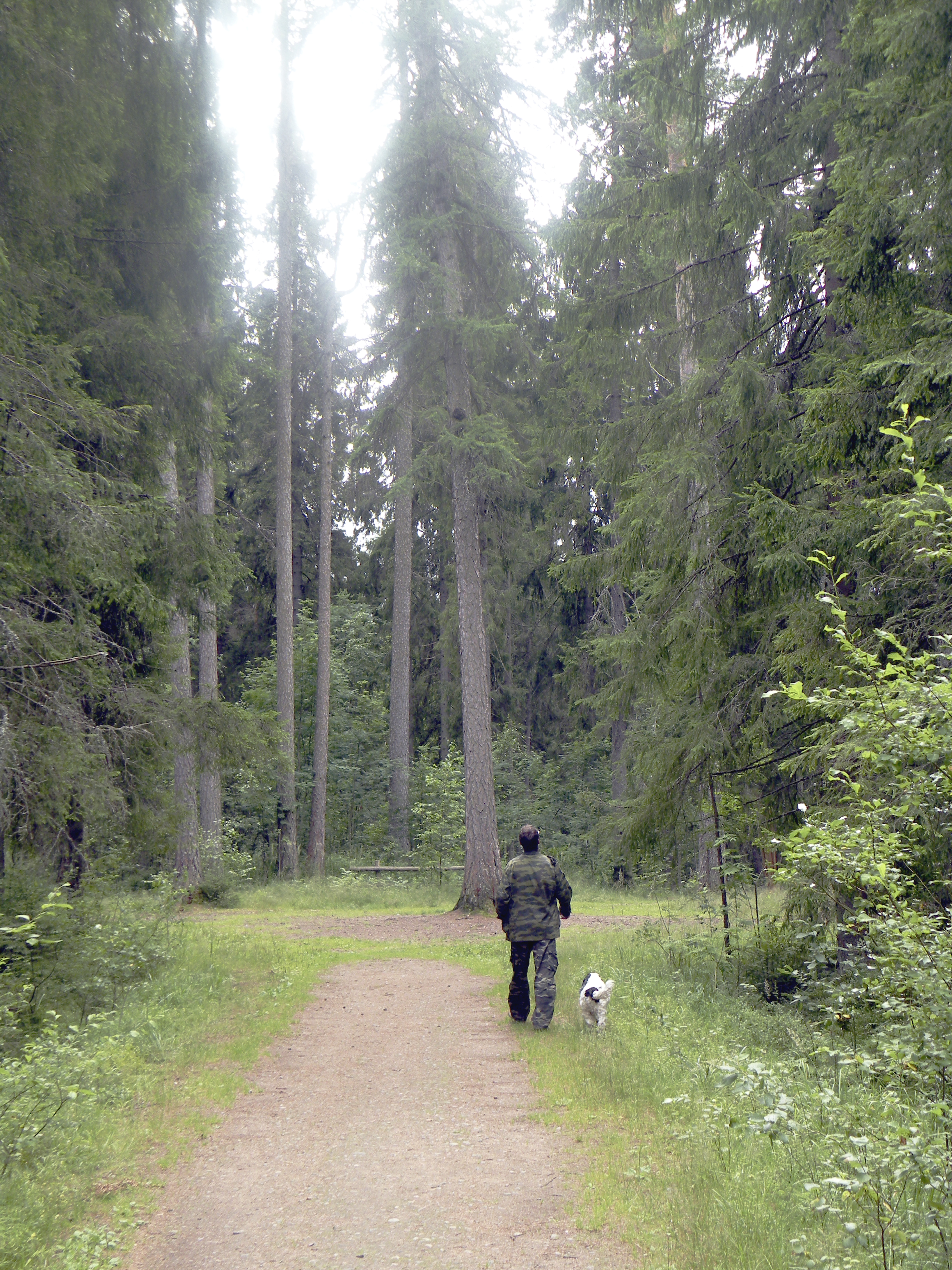 Мачтовый лес (Линдуловская роща)